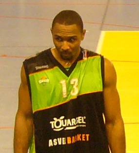 Le joueur américain de basket-ball Eric Campbell (ASVEL Lyon-Villeurebanne, à Agde, 34)